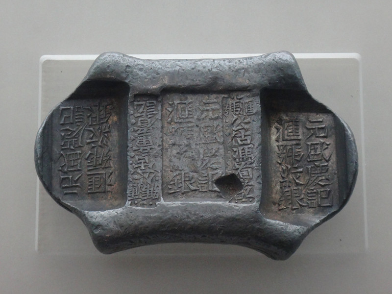 牌坊锭，钤印有“元盛庆记汇号纹银”、“汇号公估童看讫”、“汇号公估冯看讫”字样